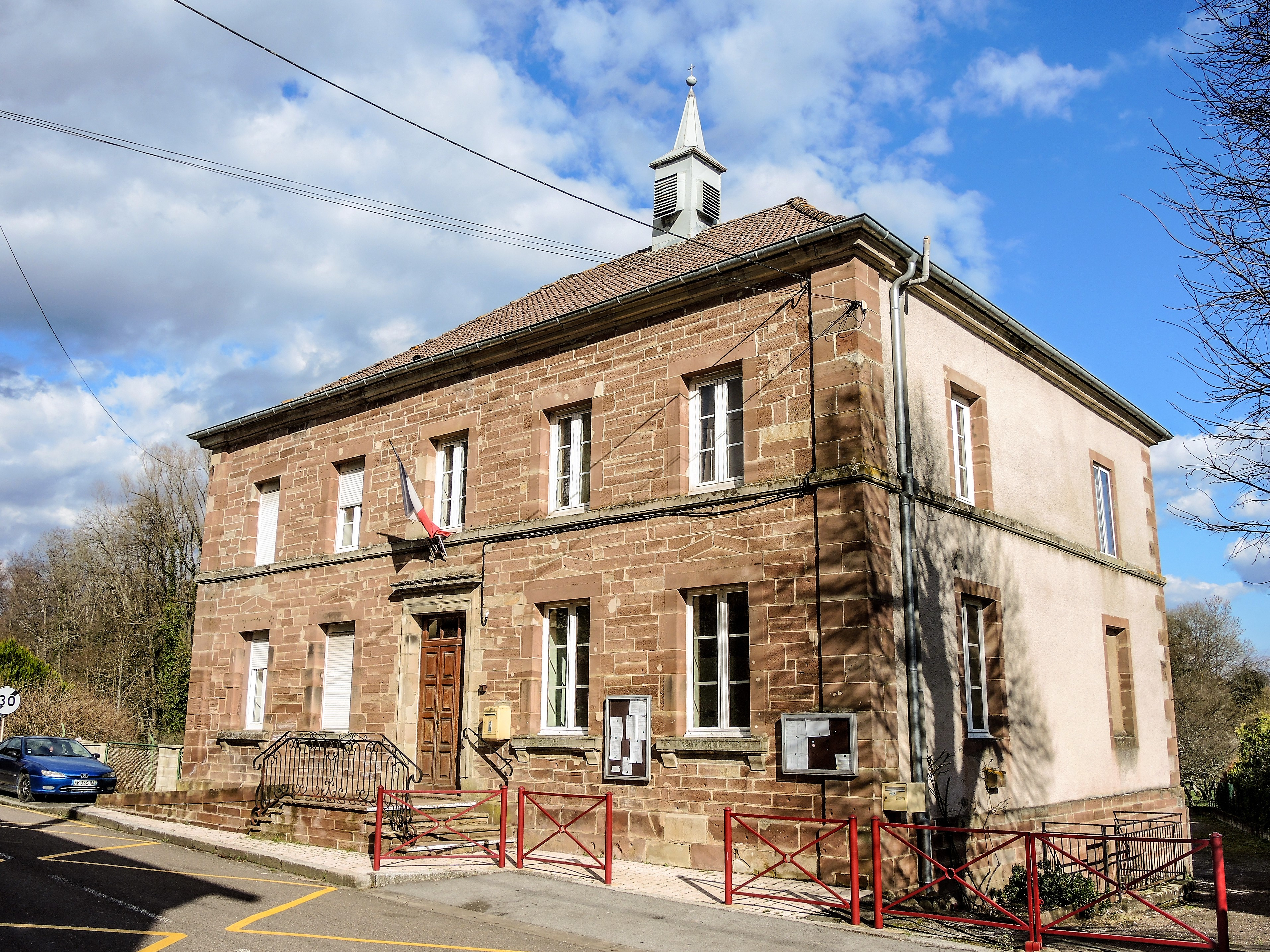 Mairie du village